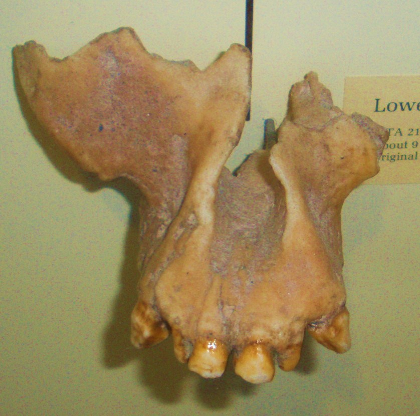 Fossil of Ankarapithecus (MTA 2125), an extinct mammal -- Took the photo at Natural History Museum, London